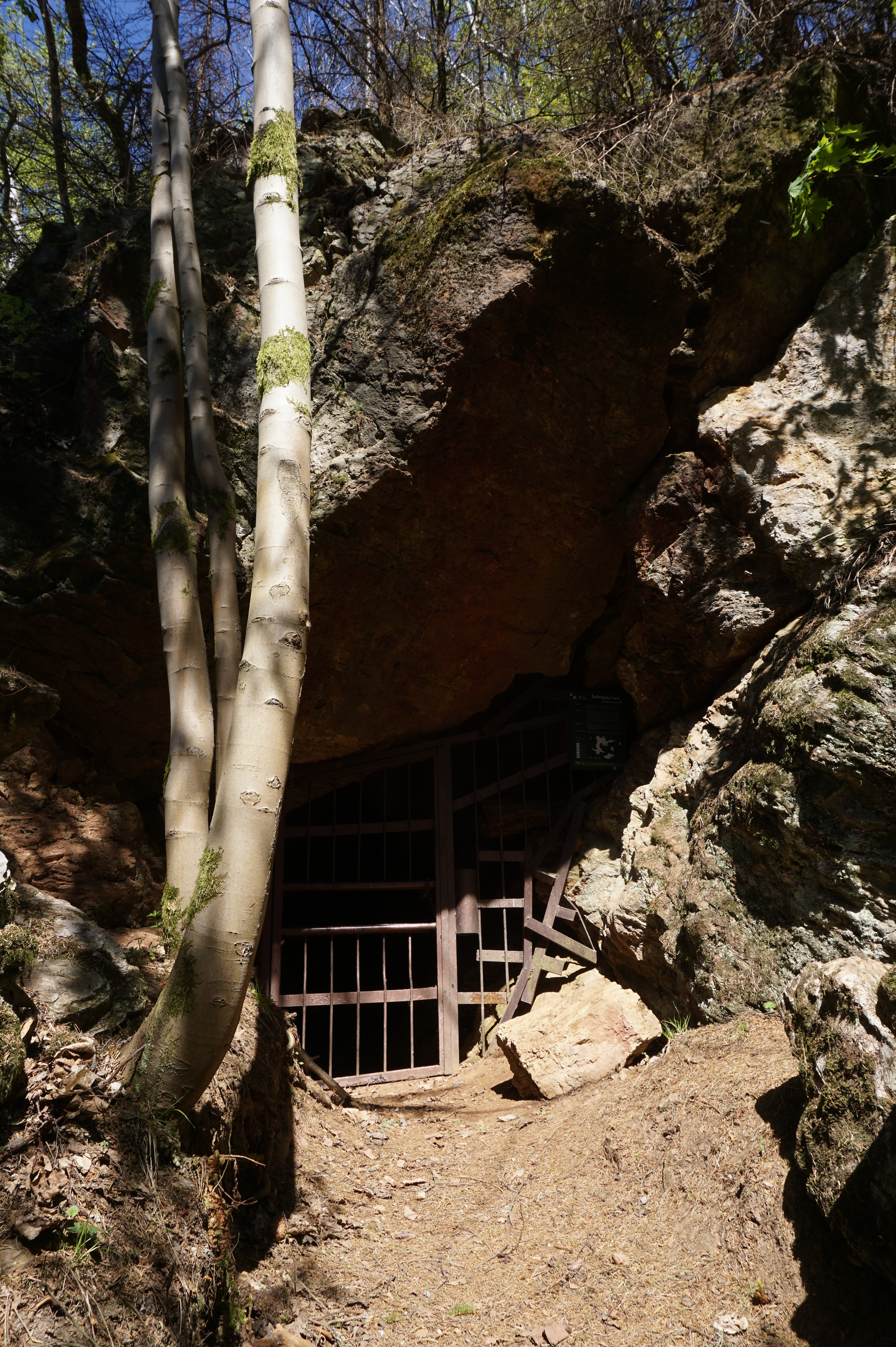 Loupežnická jeskyně v Solvayově lomu u Křižan